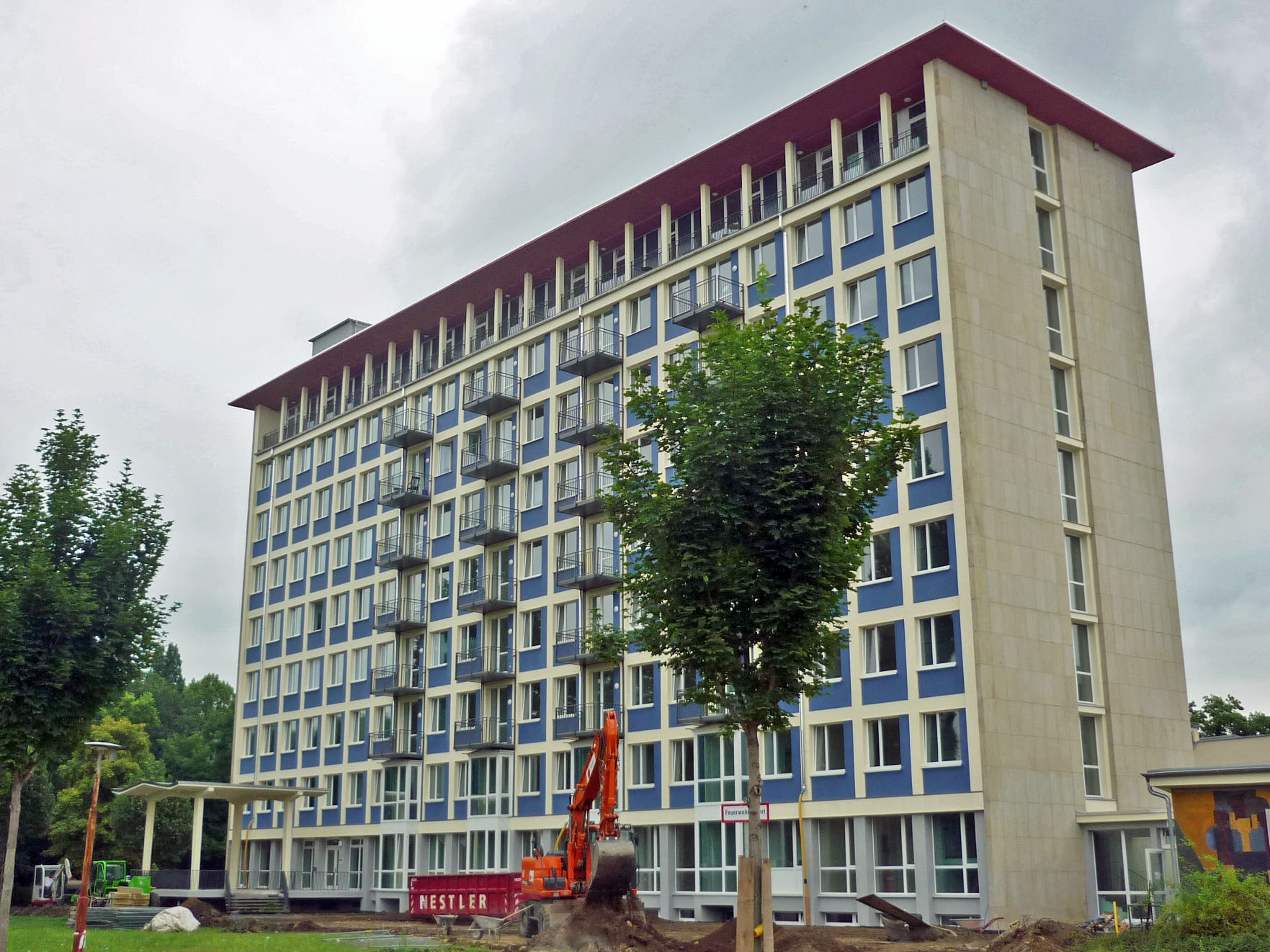 Saniertes Gebäude Gerhard-Hauptmann-Str. 1 in Dresden-Strehlen